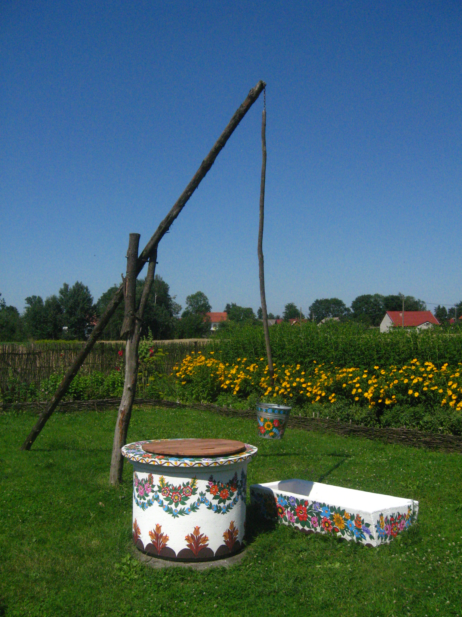 Żuraw w Zalipiu